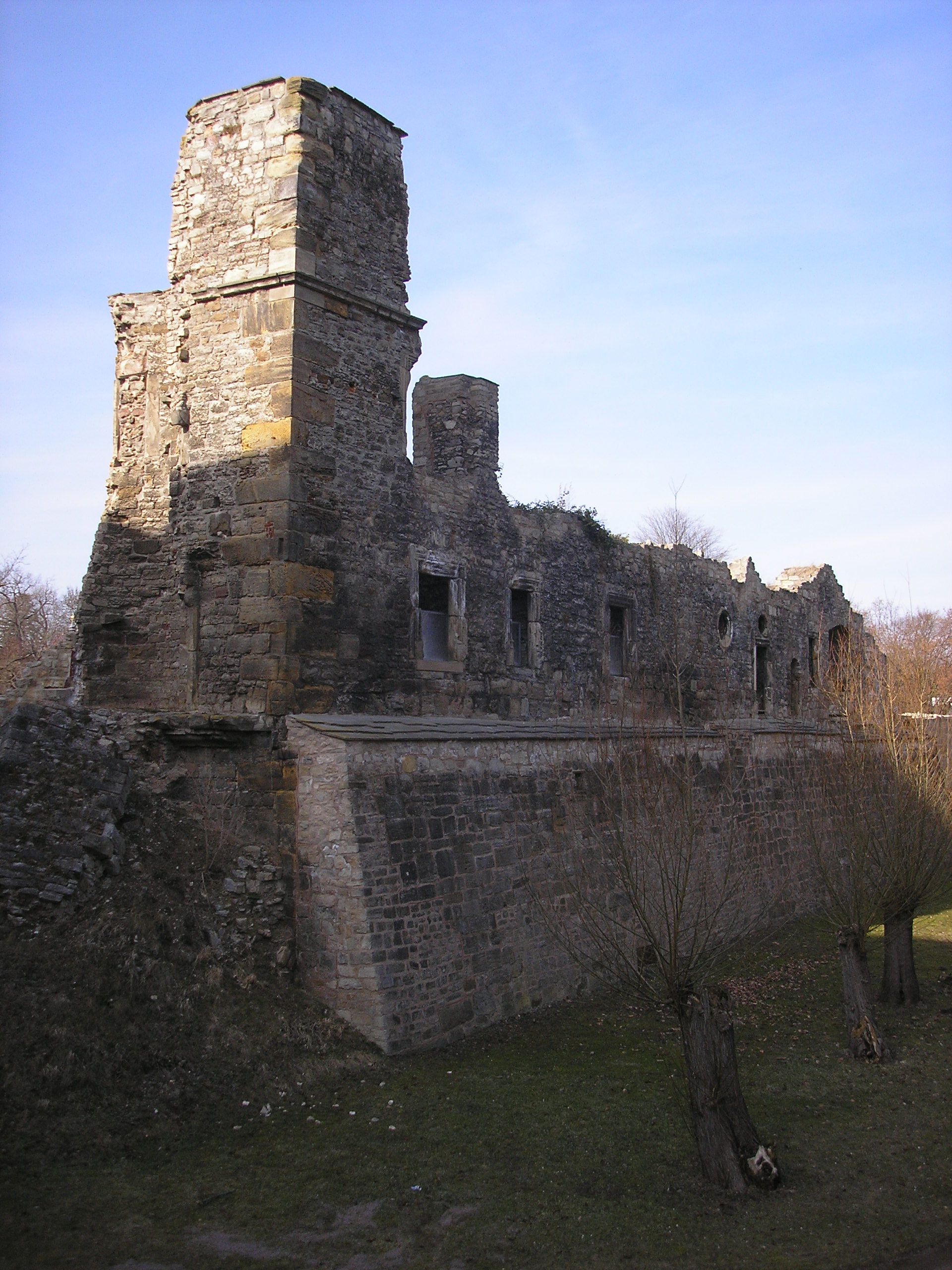 Die Schlossruine in Arnstadt (Thüringen).